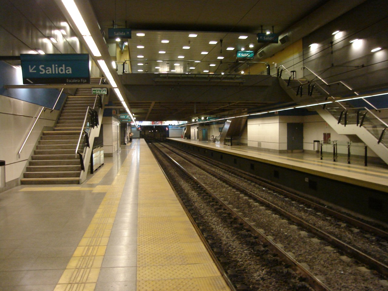 Vista de la estación Puan de la línea A de la red de subterráneos de Buenos Aires desde la punta oeste del andén descendente.